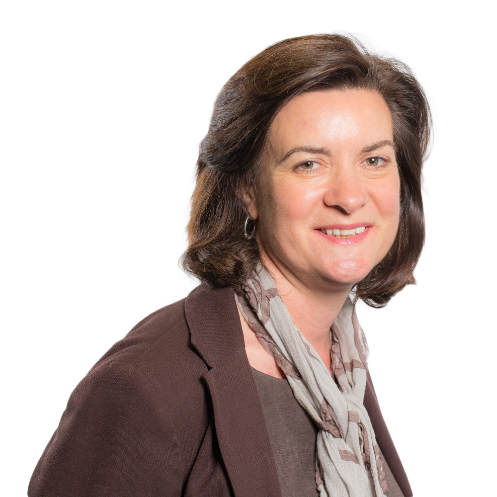 Plaid: Llafur Cymru Rhanbarth: Canolbarth a Gorllewin Cymru Party: Welsh Labour Region: Mid and West Wales